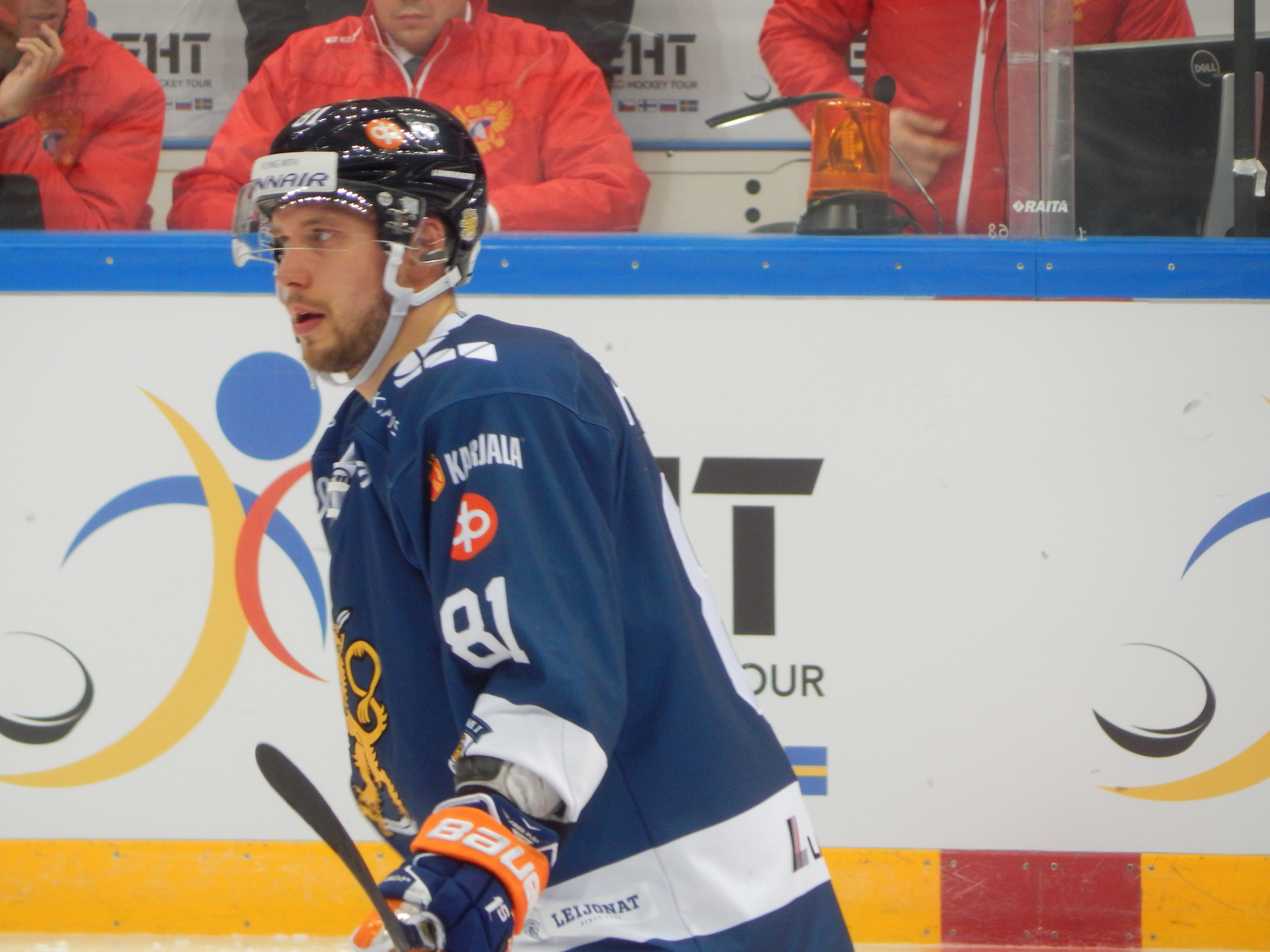 Кубок Первого Канала 2017, матч Финляндия - Южная Корея (15 декабря 2017) 81 PELTOLA,Jukka